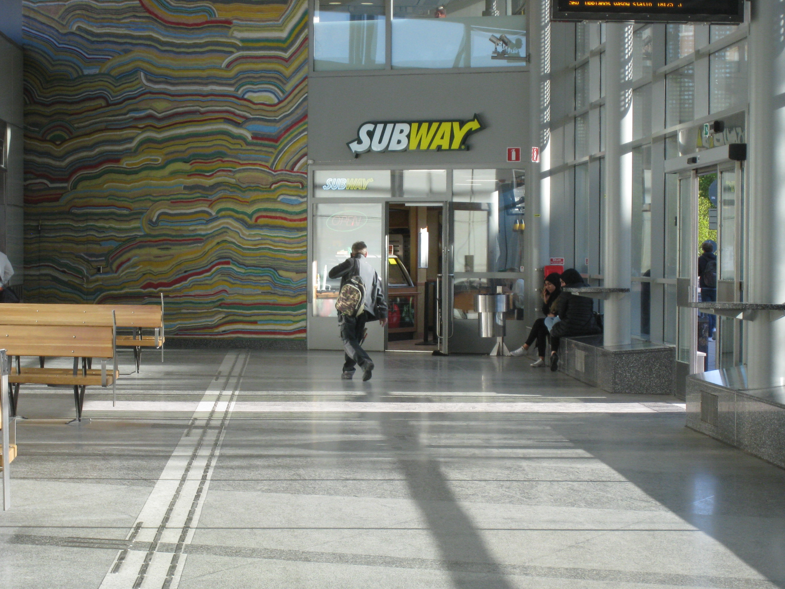 Interiör i Jakobsbergs bussterminal, Jakobsberg, Järfälla kommun.